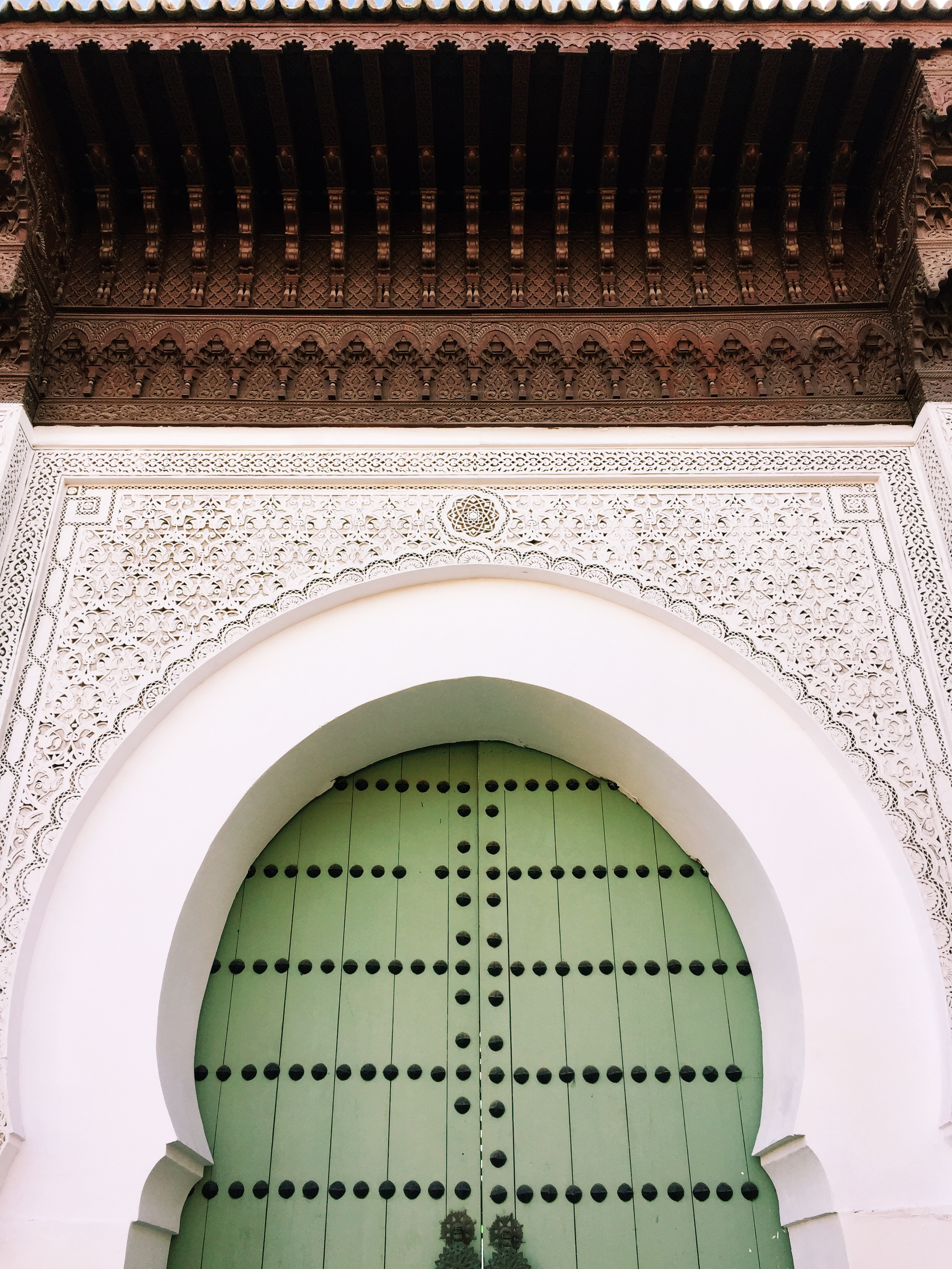 باب جامع باب الدكالة